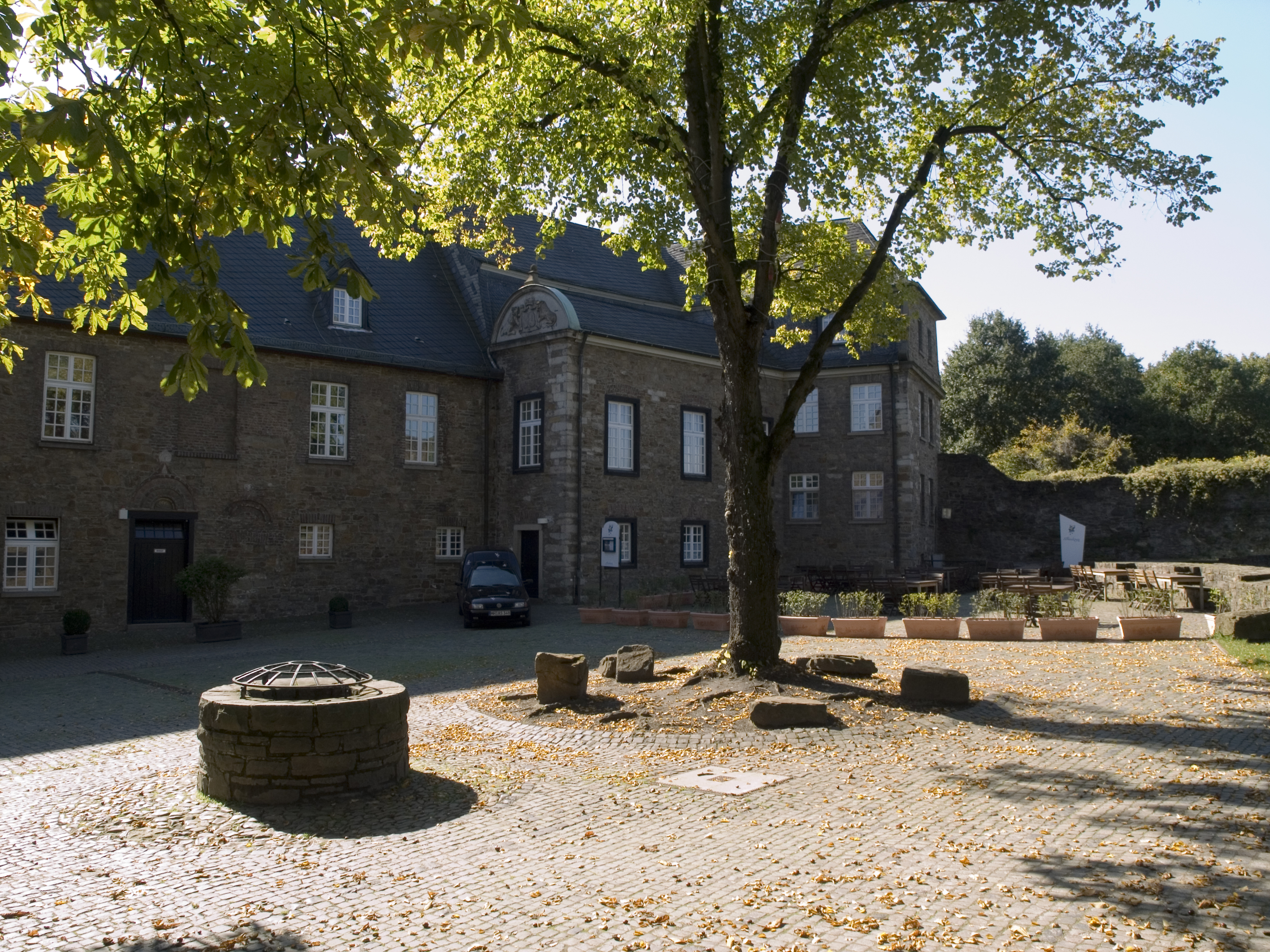 Северный Рейн-Вестфалия, Мюльхайм-на-Руре - замок Бройх